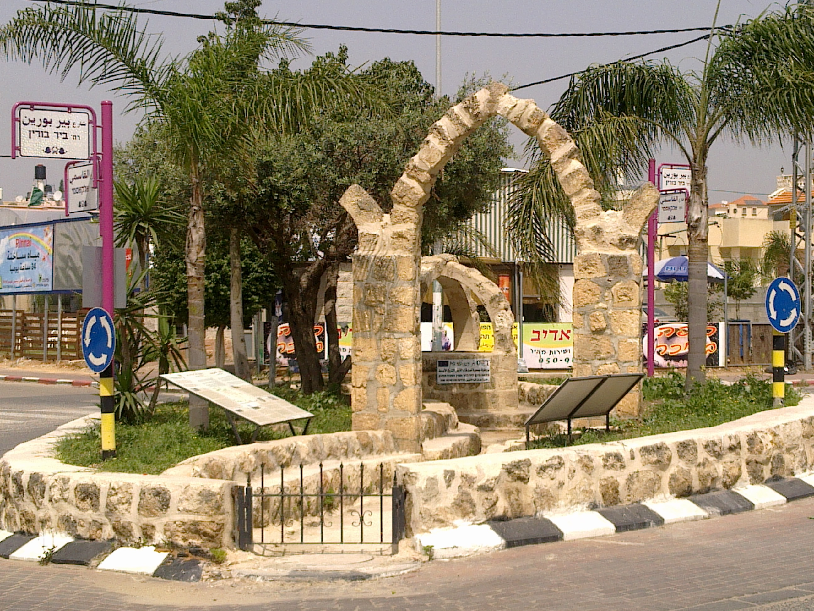 ביר בורין